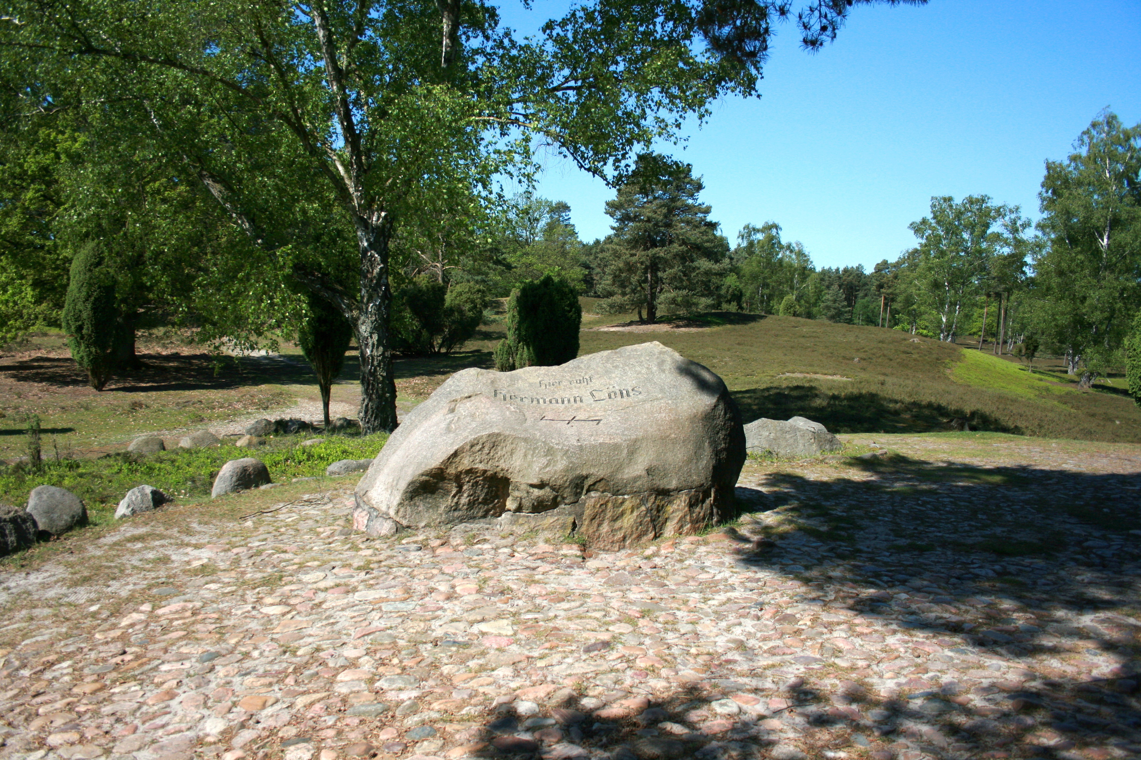 Löns-Grab im Tietlinger Wacholderhain in Walsrode